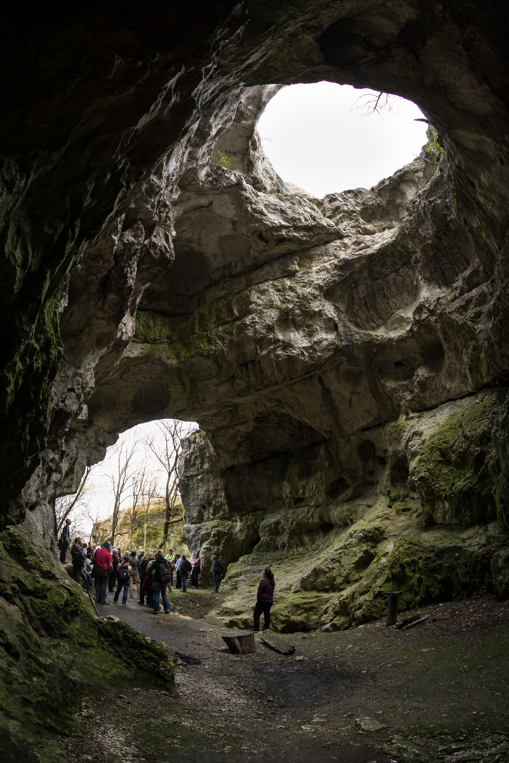 Die Jankovich-Höhle bei Bajót im ungarischen Gerecse-Gebirge.